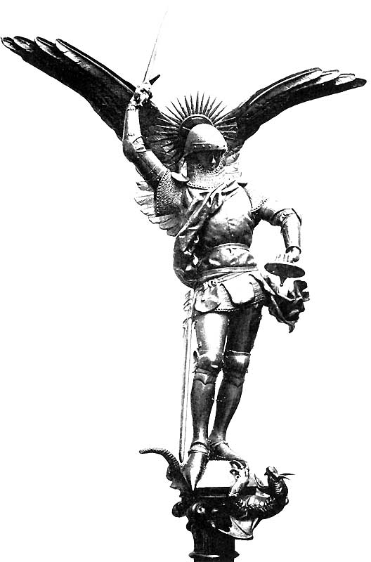 Statue de l’«Archange Saint-Michel terrassant le dragon» couronnant la flèche du clocher de l’église abbatiale du Mont-St-Michel, par Emmanuel Frémiet (installée en 1897). Provient de l’édition anastaltique de l’ouvrage "Le Mont Saint-Michel", par Paul Gout (1910); ne comporte pas de copyright.